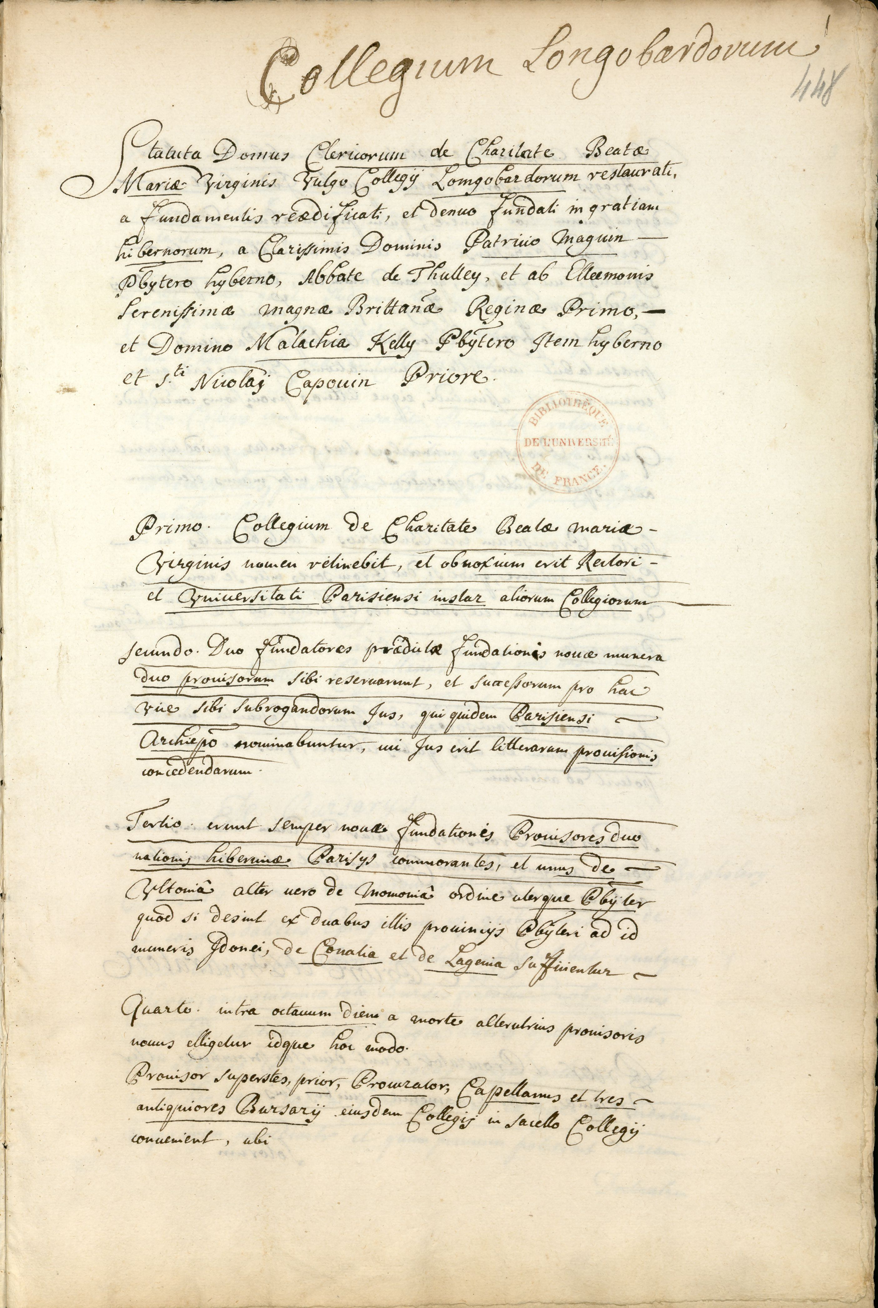 Manuscrit en latin, dans un registre de 738 feuillets consacré aux fondations et statuts des collèges.